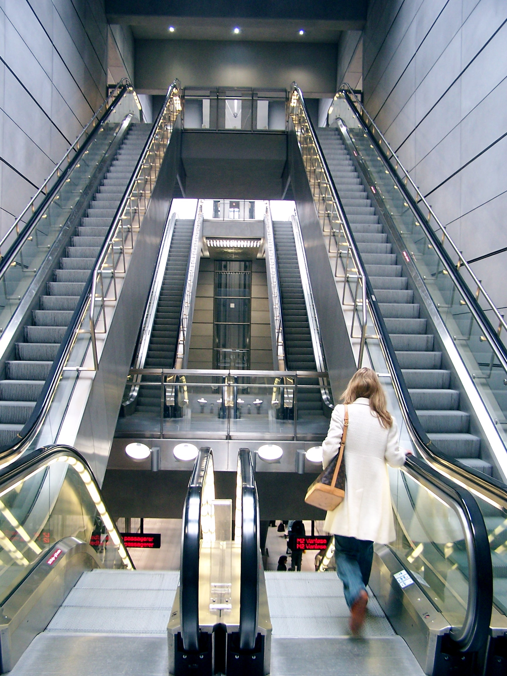 De minimalistiske rulletrappene på Lergravsparken stasjon.